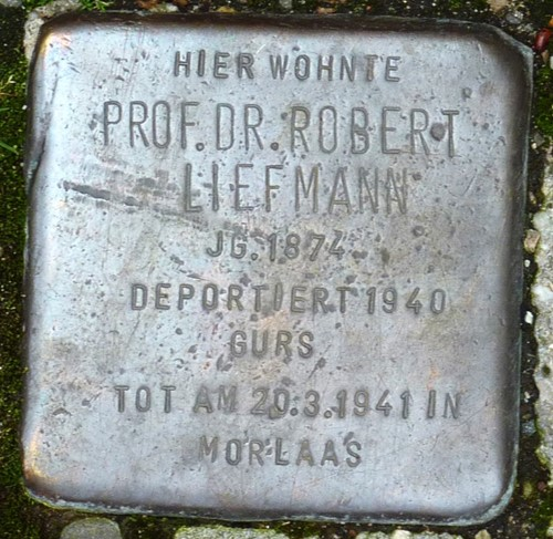 Deutschland (D) - Baden-Württemberg (BW) - Freiburg im Breisgau (FR): Stolperstein für Prof. Dr. Robert Liefmann Aus Originaldatei Originaldatei von James Steakley entnommen und bearbeitet.